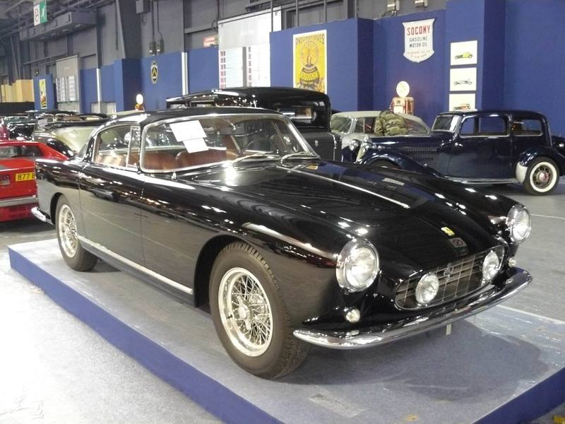 Retromobile 2012